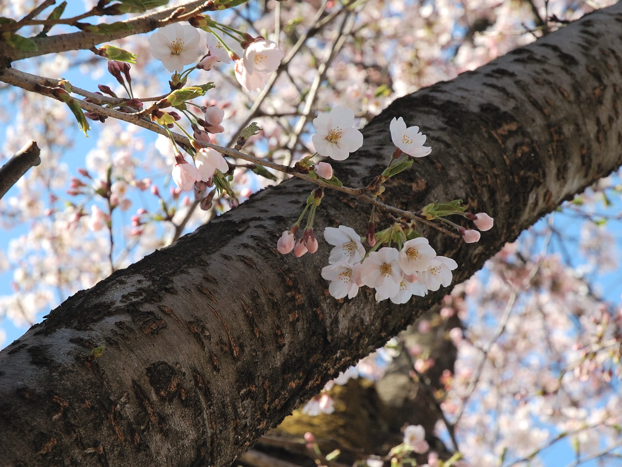 Prunus serrulata (サクラ)